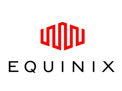 Logo Equinix